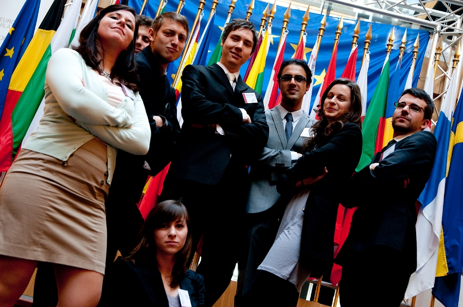 Ministrowie